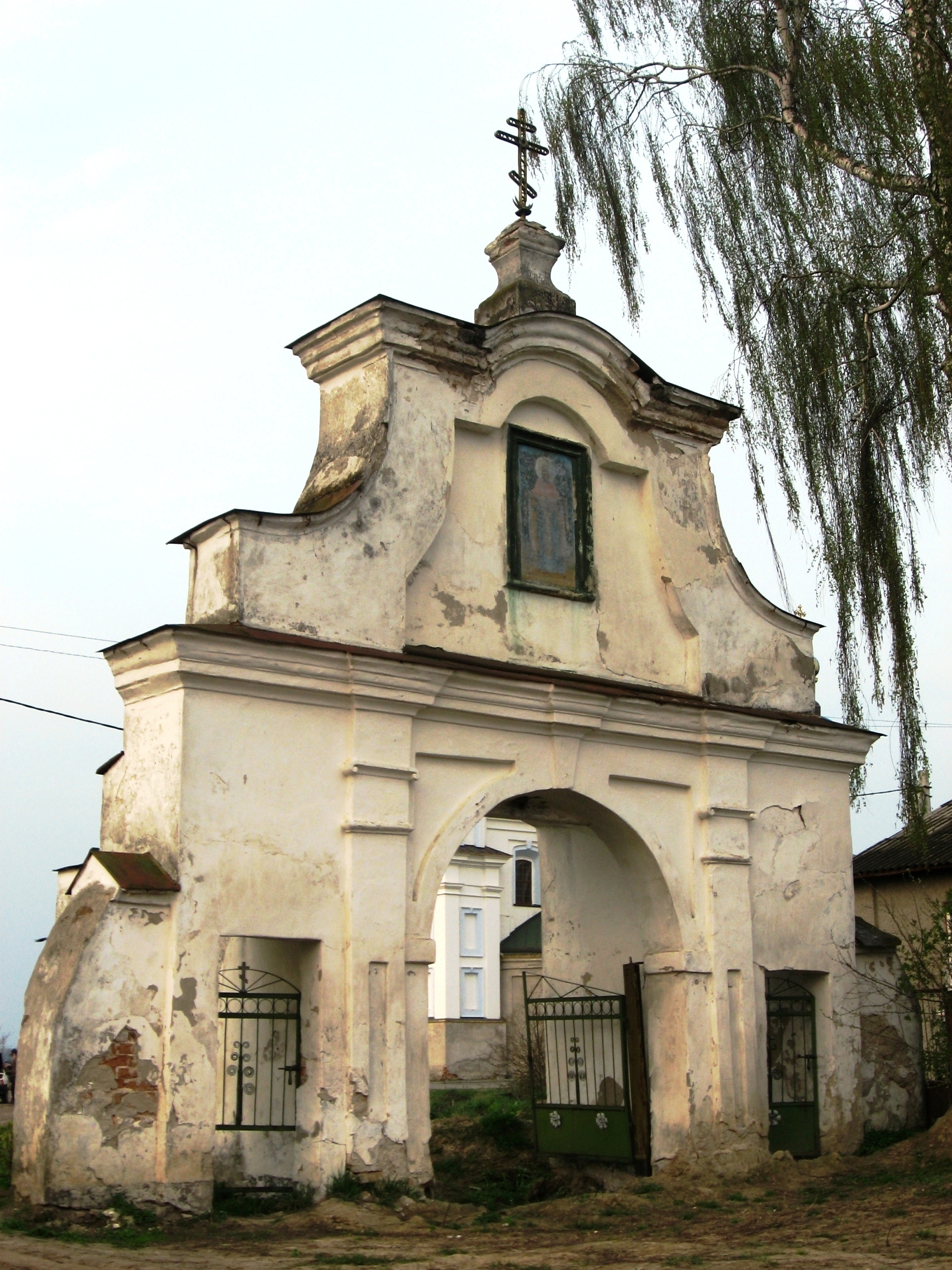 Піддубці, Волинська обл. Брама Покровської церкви